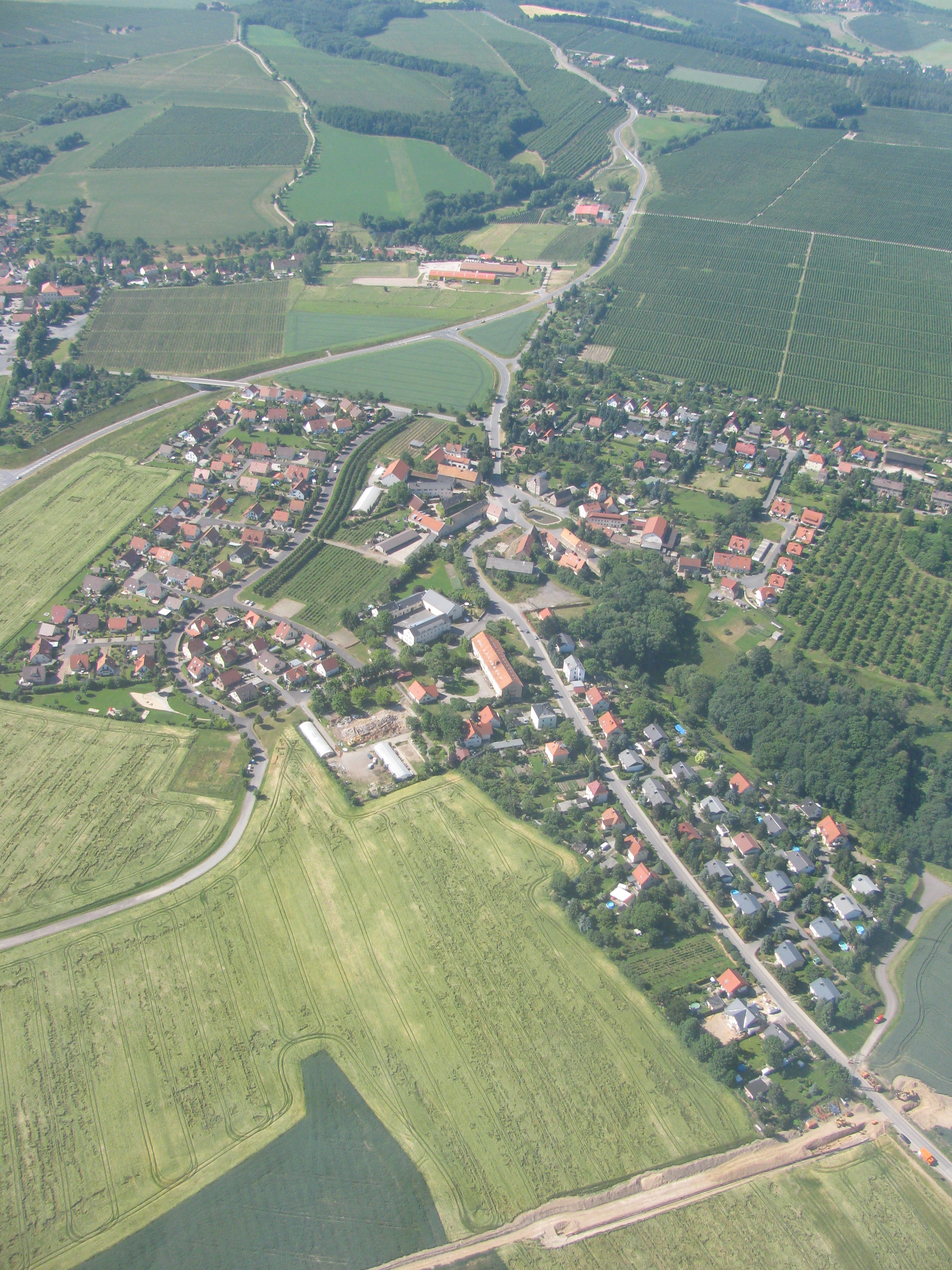 Luftbild Borthen Dohna